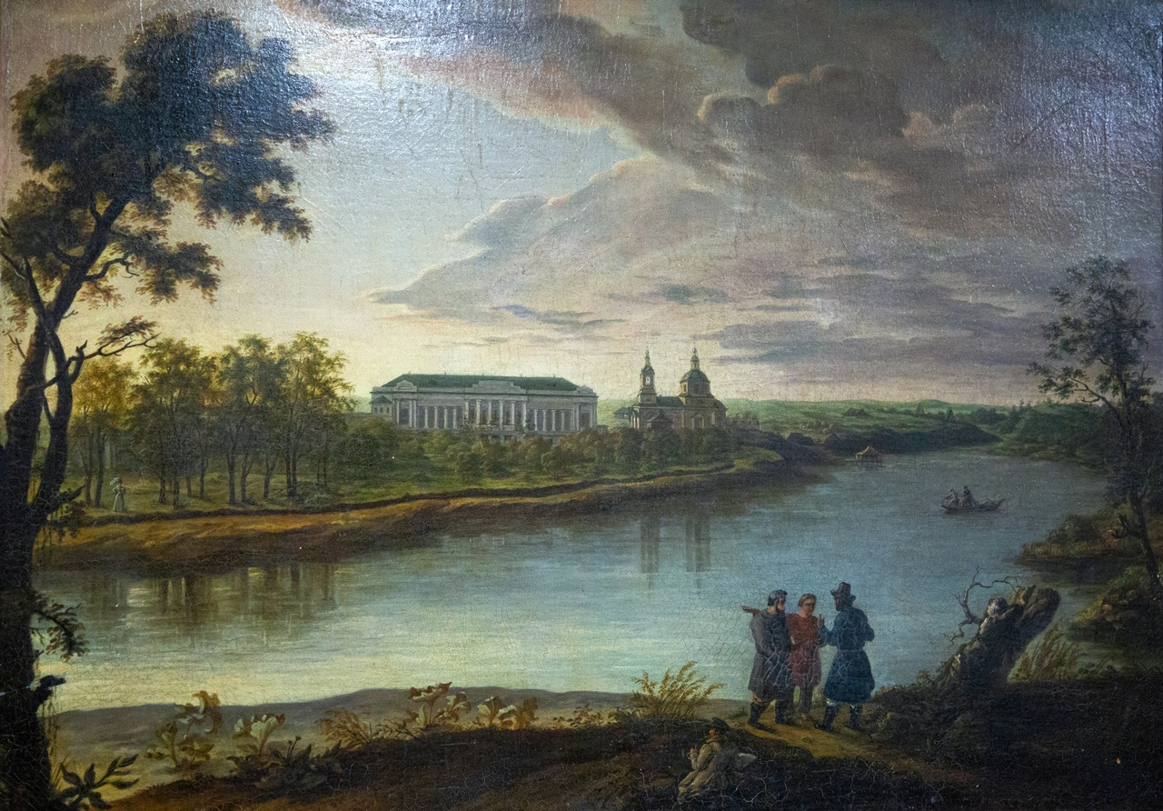 Беково в п. п. XIX века, картина крепостного художника, картина находится в Саратовском краеведческом музее.